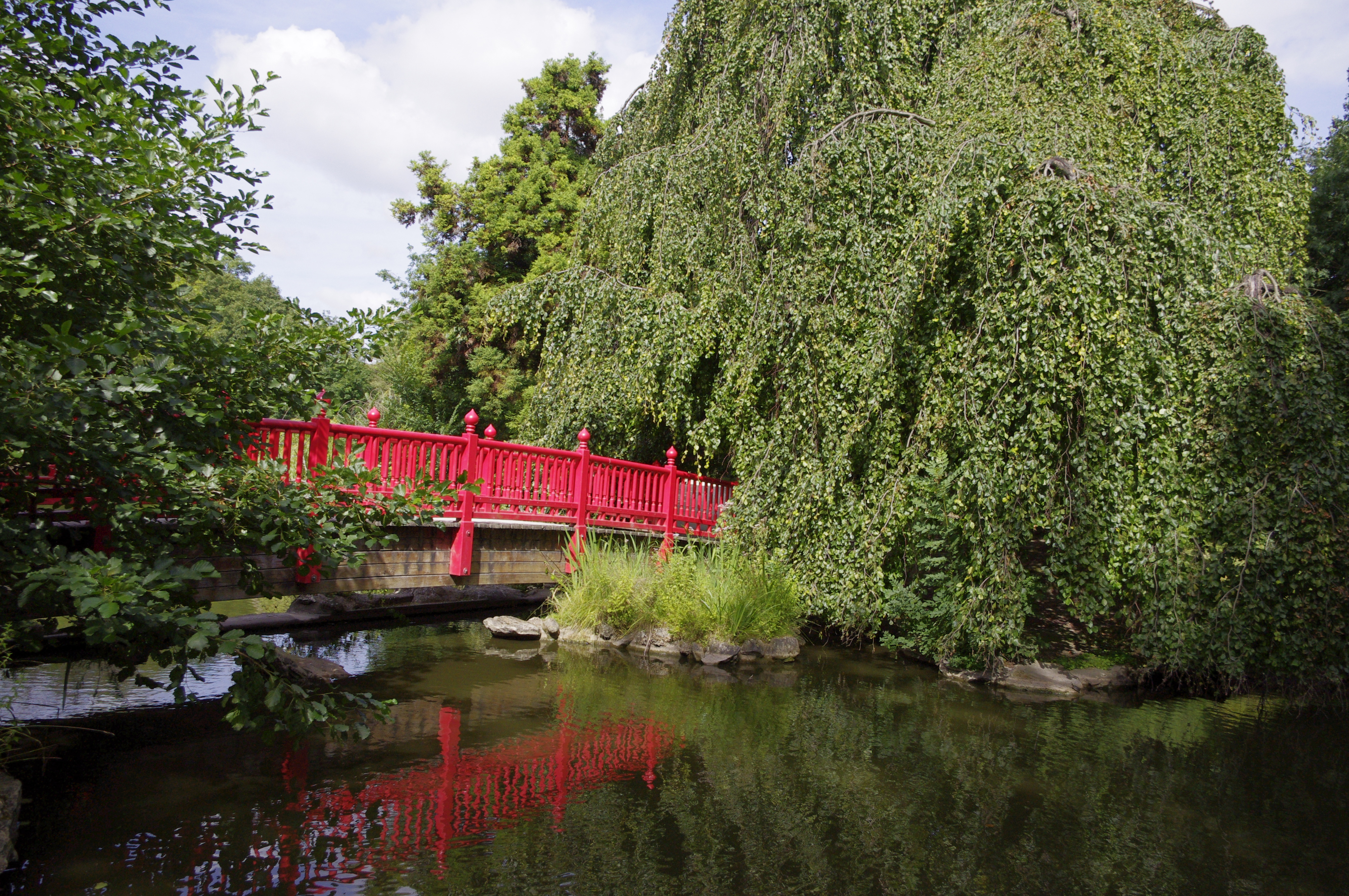 Parc Edmond de Rothschild à Boulogne-Billancourt, France - pont rouge sur l'étang avec le hêtre pleureur classé arbre remarquable